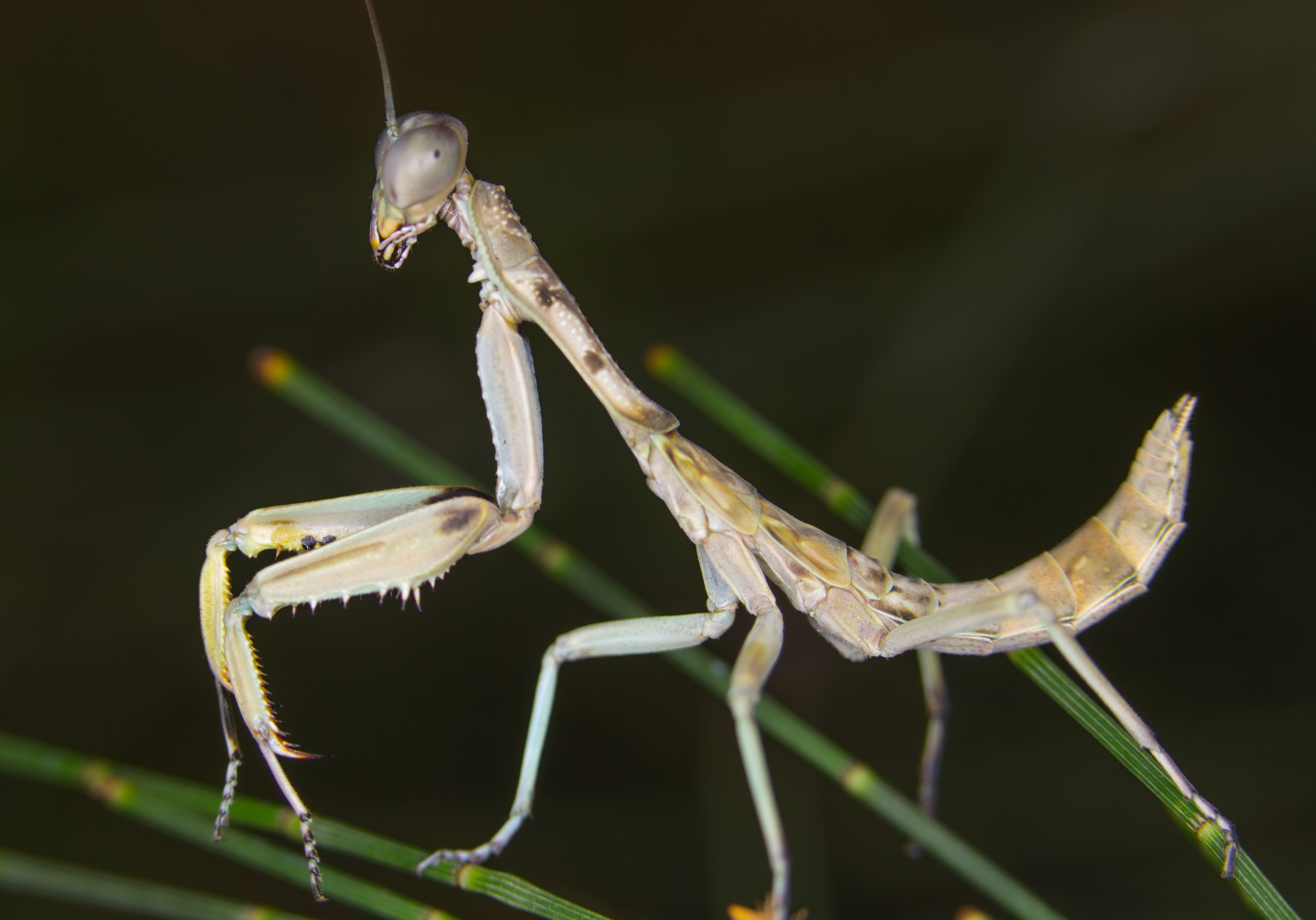 Burying mantis